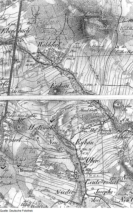 Original image description from the Deutsche Fotothek Eibau. Oberreit, Sect. Zittau, 1844/46